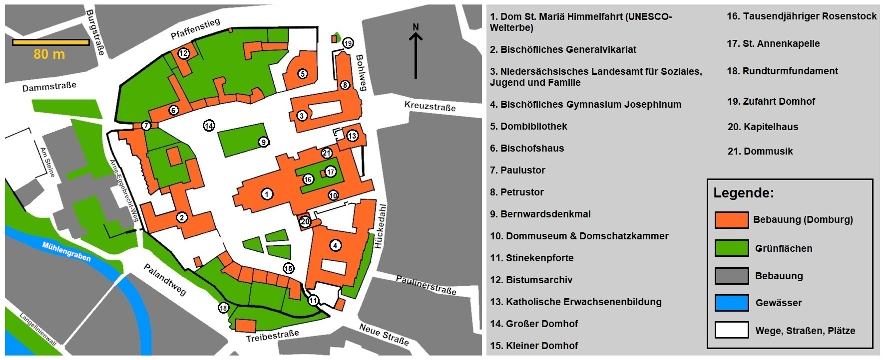 Übersichtskarte des Domhofs in Hildesheim